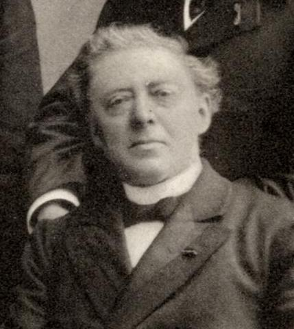 Willem van der Kaay